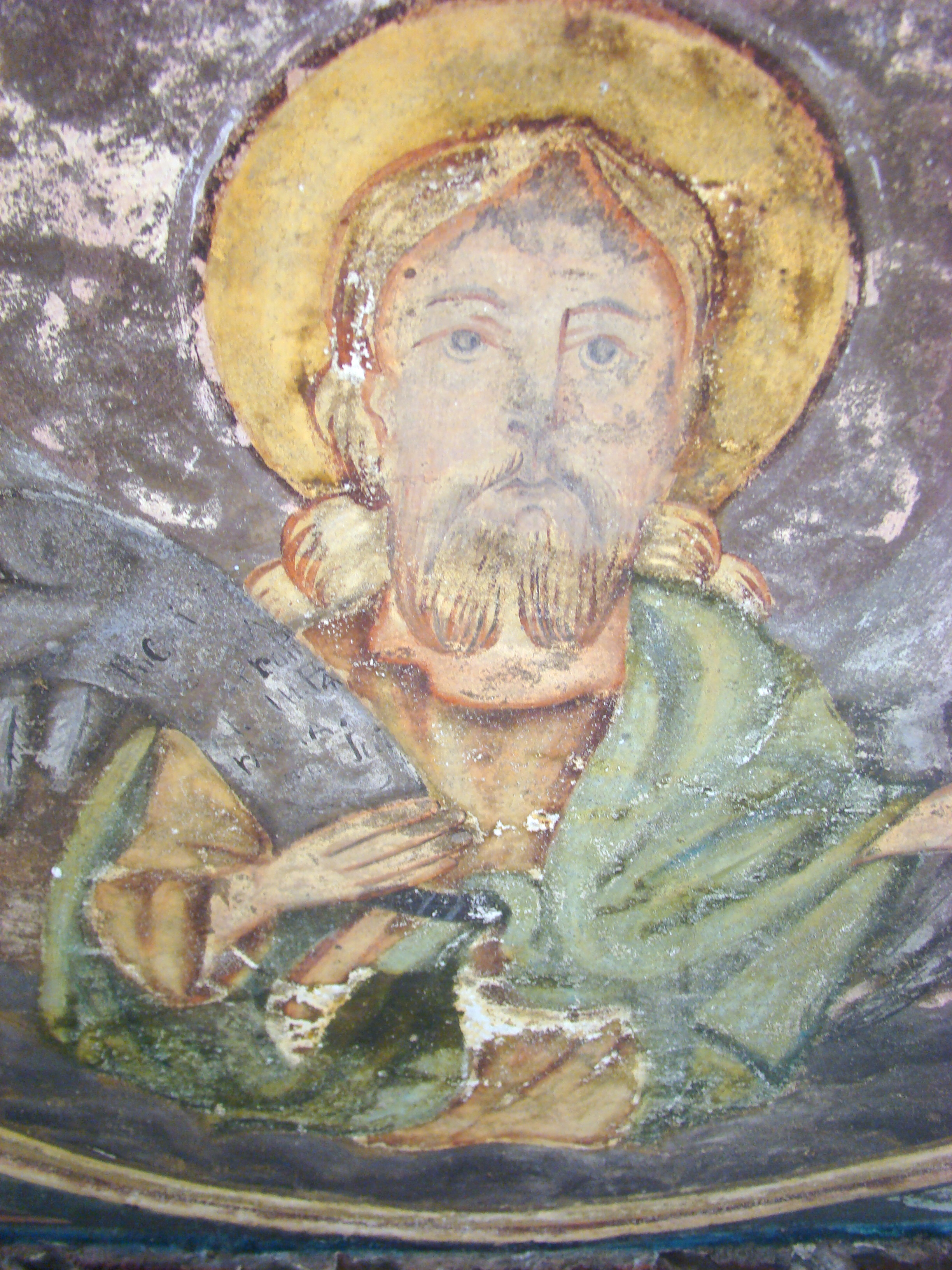 Biserica de lemn „Sf. Nicolae”, sat Lunca; comuna Vladimir